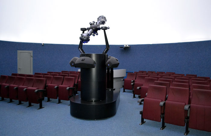 Аппарат планетария